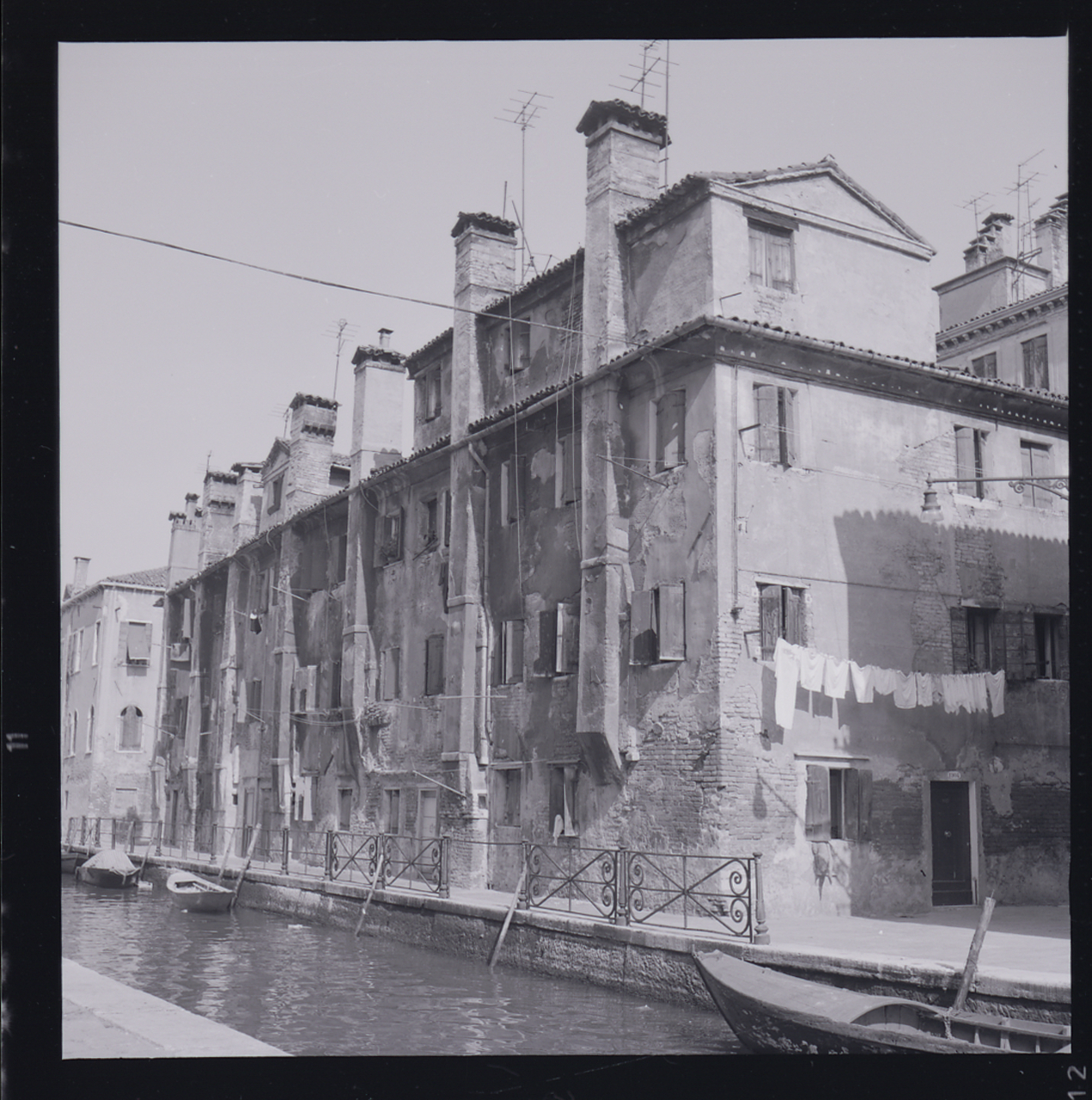 Servizio fotografico : Venezia, 1969 / Paolo Monti. - Buste: 1, Fototipi: 2 : Negativo b/n, gelatina bromuro d'argento/ pellicola ; 6x6. - ((Serie costituita da 1 contenitore portanegativi con 2 strisce di negativi identificabili con i nn.: 19125, 1912619136, 19137 (non è però possibile identificarli singolarmente non essendoci scritti i numeri in corrispondenza del singolo negativo). - Occasione: Documentazione per la pubblicazione: Arslan Edoardo, "Venezia gotica: architettura civile gotica veneziana", Milano, Electa, 1970. - Fonte: Monografia di Arslan, Edoardo: Venezia gotica: architettura civile gotica veneziana, Milano, Electa (1970)